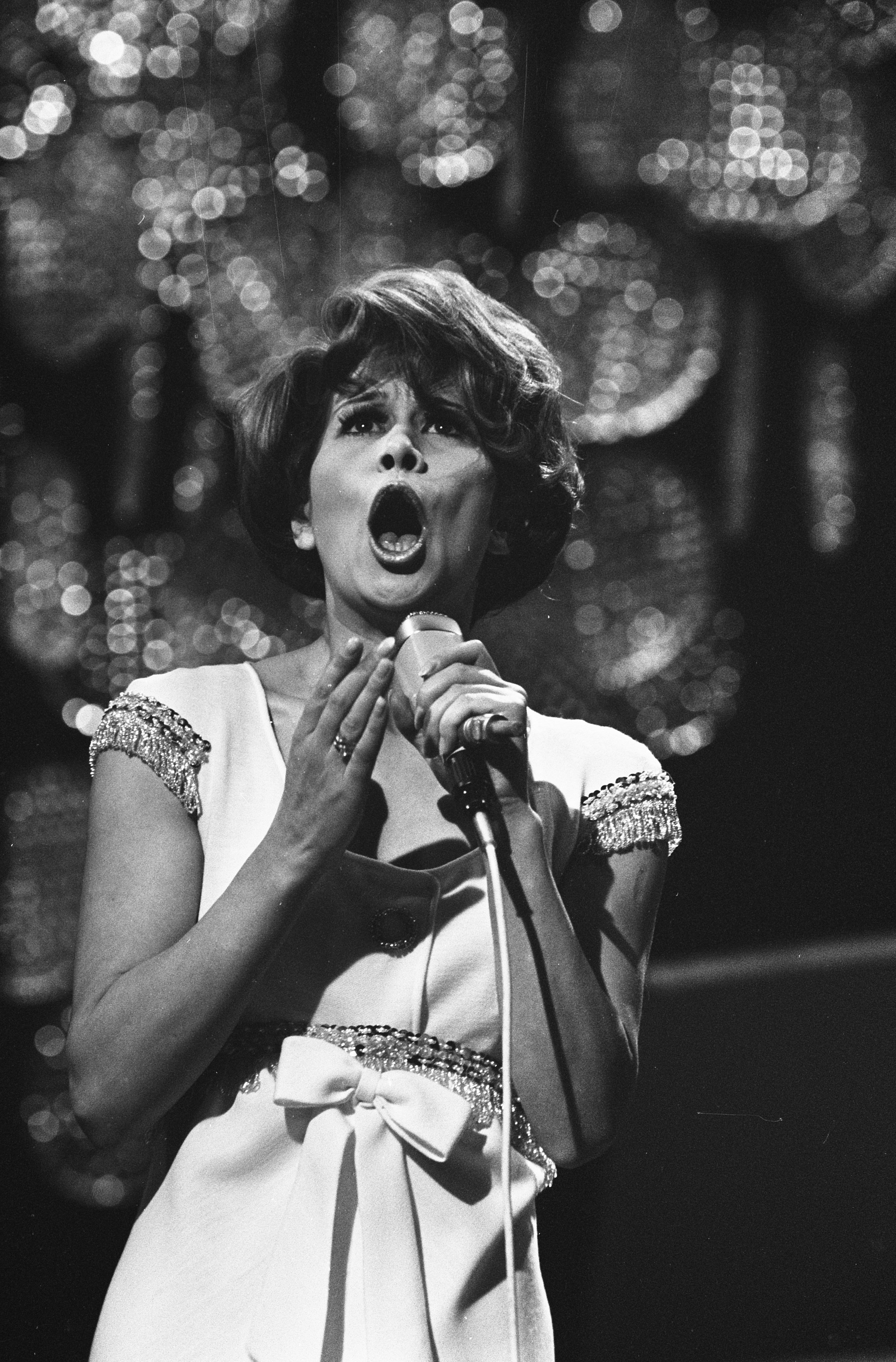 Collectie / Archief : Fotocollectie Anefo Reportage / Serie : [ onbekend ] Beschrijving : Nationale finale van het Eurovisie Songfestival in Scheveningen Anneke Gronloh Datum : 26 februari 1969 Locatie : Scheveningen, Zuid-Holland Trefwoorden : SONGFESTIVALS, finales Persoonsnaam : Grönloh, Anneke Fotograaf : Koch, Eric / Anefo Auteursrechthebbende : Nationaal Archief Materiaalsoort : Negatief (zwart/wit) Nummer archiefinventaris : bekijk toegang 2.24.01.05 Bestanddeelnummer : 922-1427